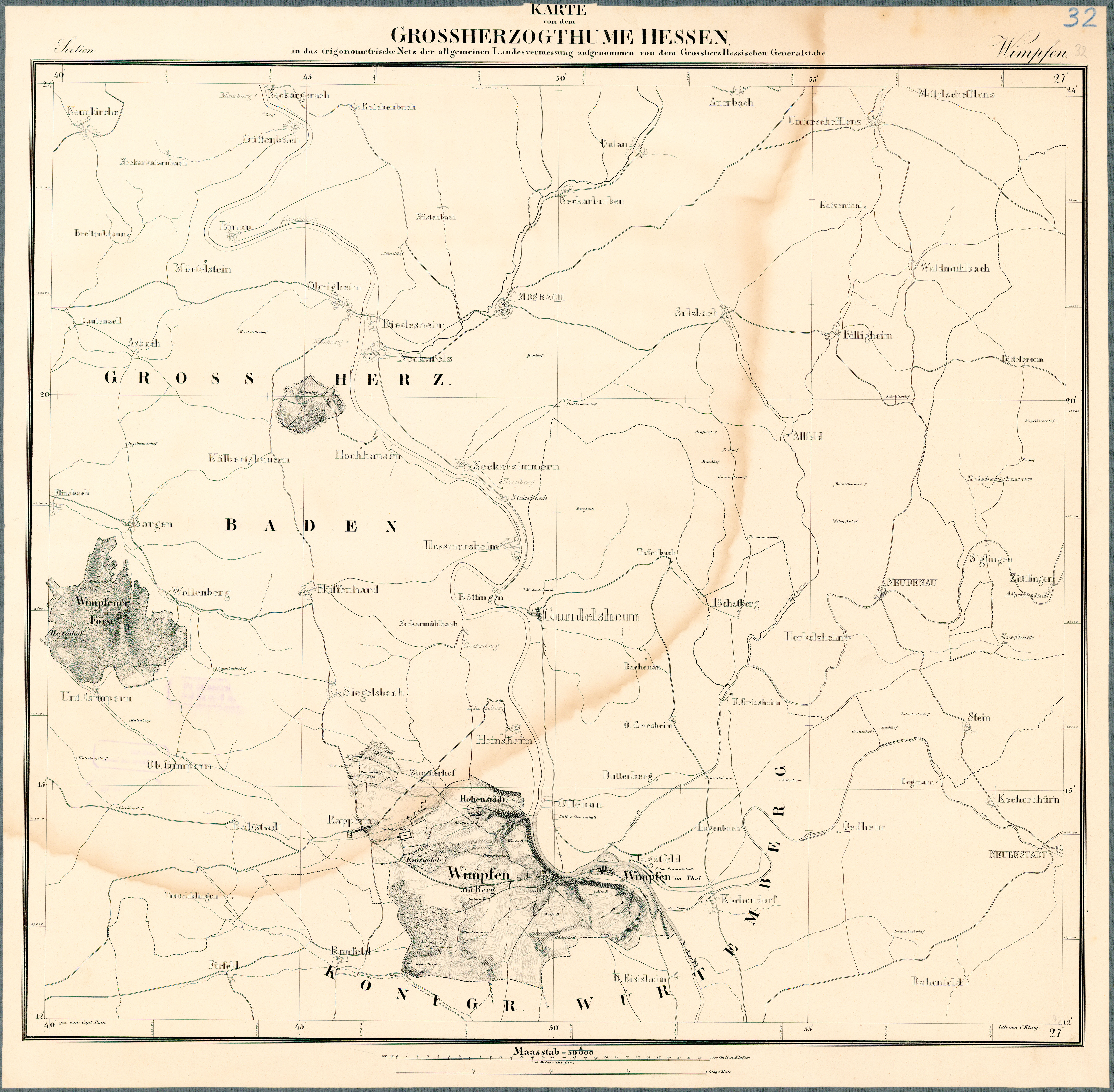 Historische Karte des Großherzogtums Hessen von 1832 bis 1850. Im Maßstab 1:50.000. Blatt 32: Wimpfen. Mit Wimpfen (heute Bad Wimpfen)